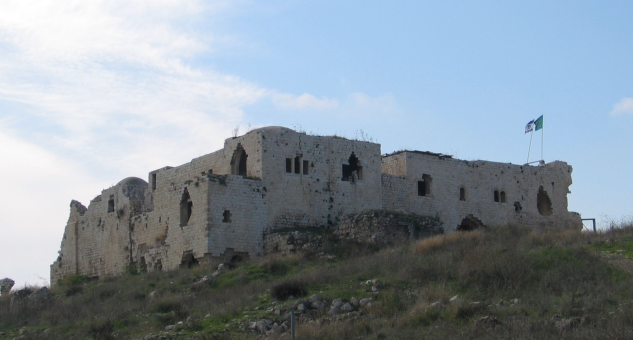 Migdal Afek, Israel.